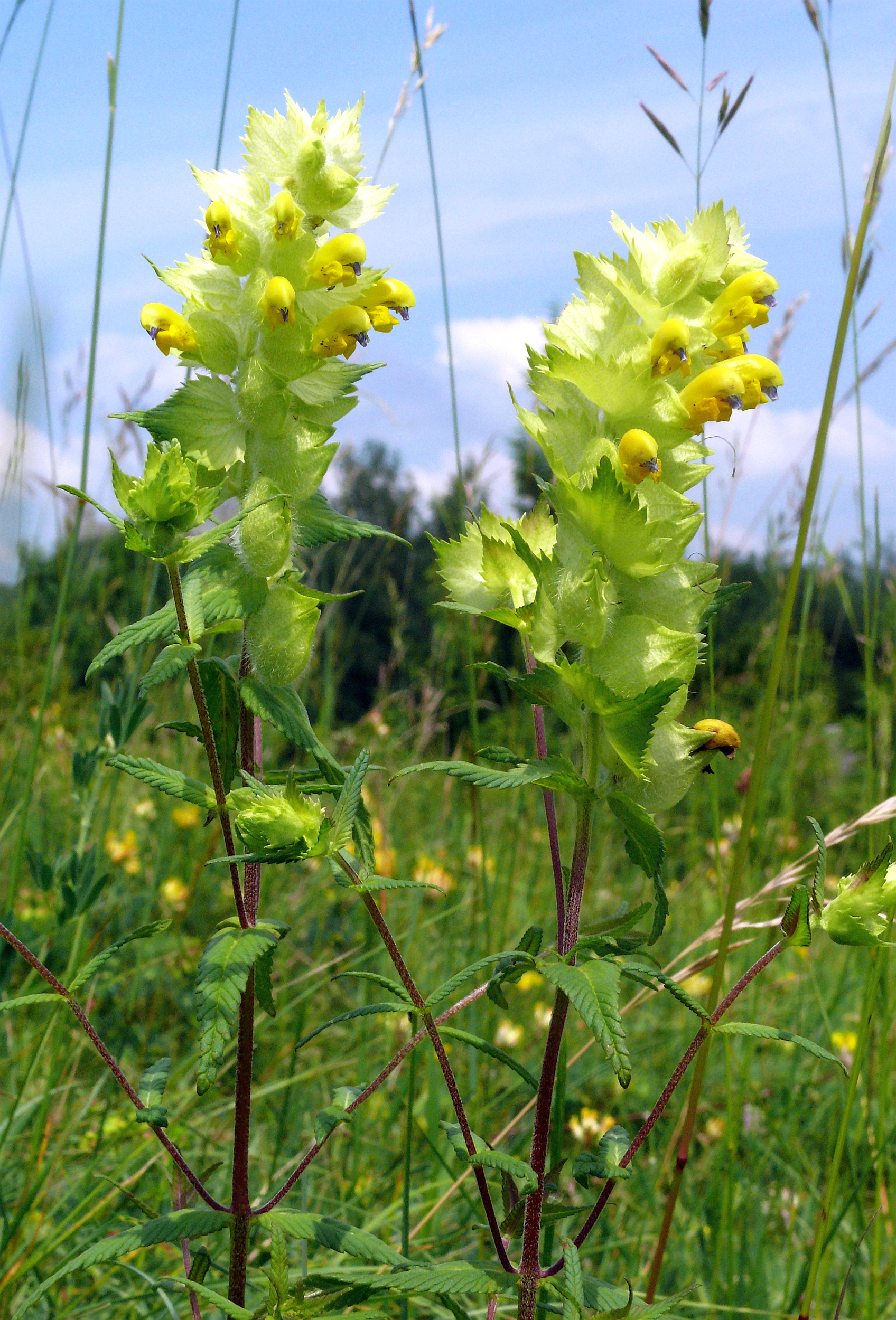 Rhinanthus alectorolophus, Nördlinger Ries, Deutschland